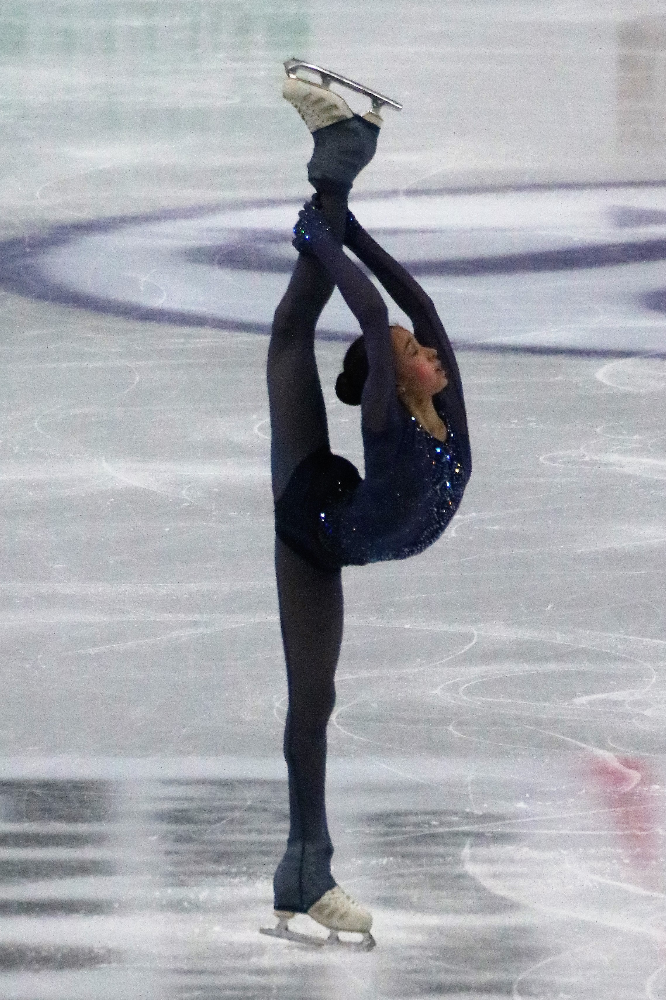 Камила Валиева (Россия) на финале юниорского Гран-при 2019-2020